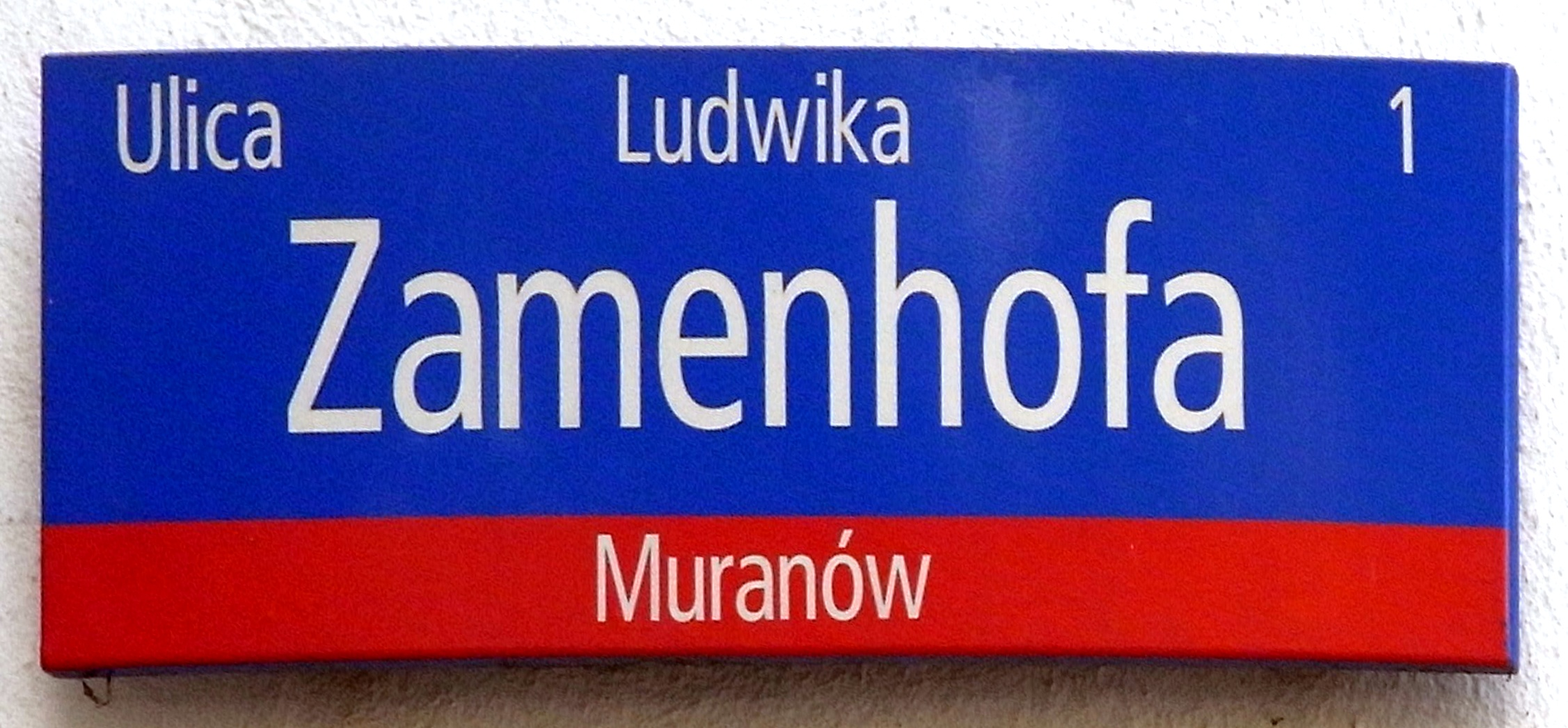 Straßenschild "Ludwika Zamenhofa" in Warschau.